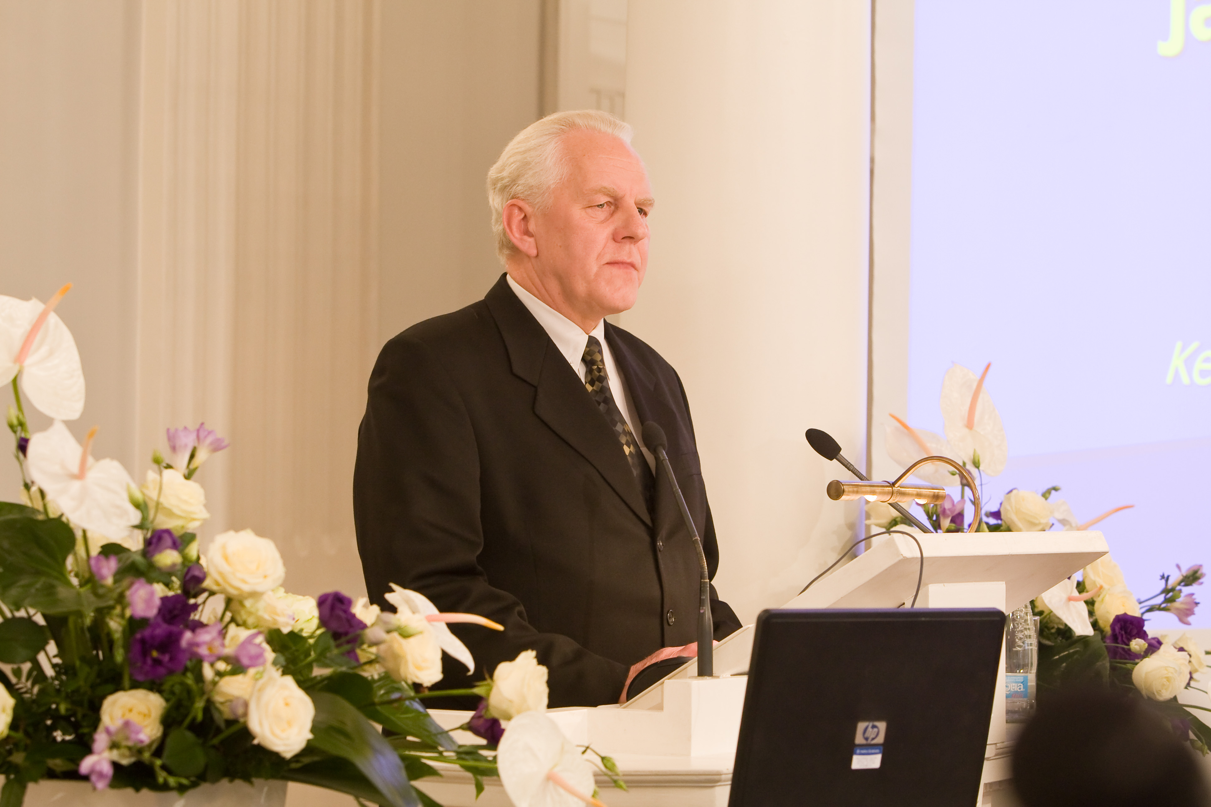 TÜ kehakultuuriteaduskonna prodekaan professor Toivo Jürimäe Tartu Ülikooli kehakultuuriteaduskonna 80. ja Tartu Ülikooli akadeemilise spordiklubi 100. aastapäeva tähistamisel. Konverents "Kehakultuurihariduse hetkeseis ja tulevikusuunad" 22. novembril 2008 TÜ aulas.